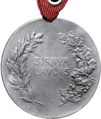 Zivil-Verdienstmedaille (Österreich-Ungarn) in Silber, Sammleranfertigung der am 30. April 1918 durch Kaiser Karl I. gestifteten Auszeichnung. Rückseite.